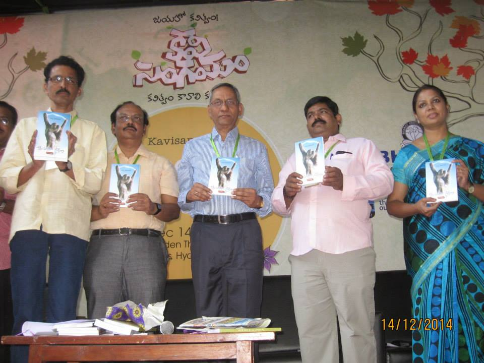 కవి రచయిత్రి సల్మా చేతుల మీదుగా పుస్తకావిష్కరణ